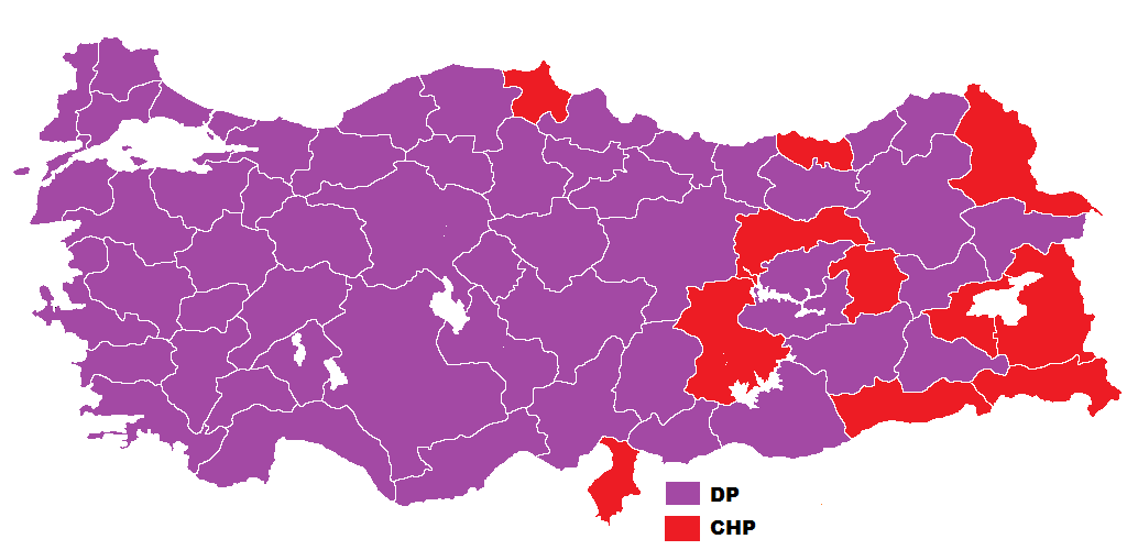 1950 genel seçimleri sonuçlarının Türkiye haritasında gösterimi.